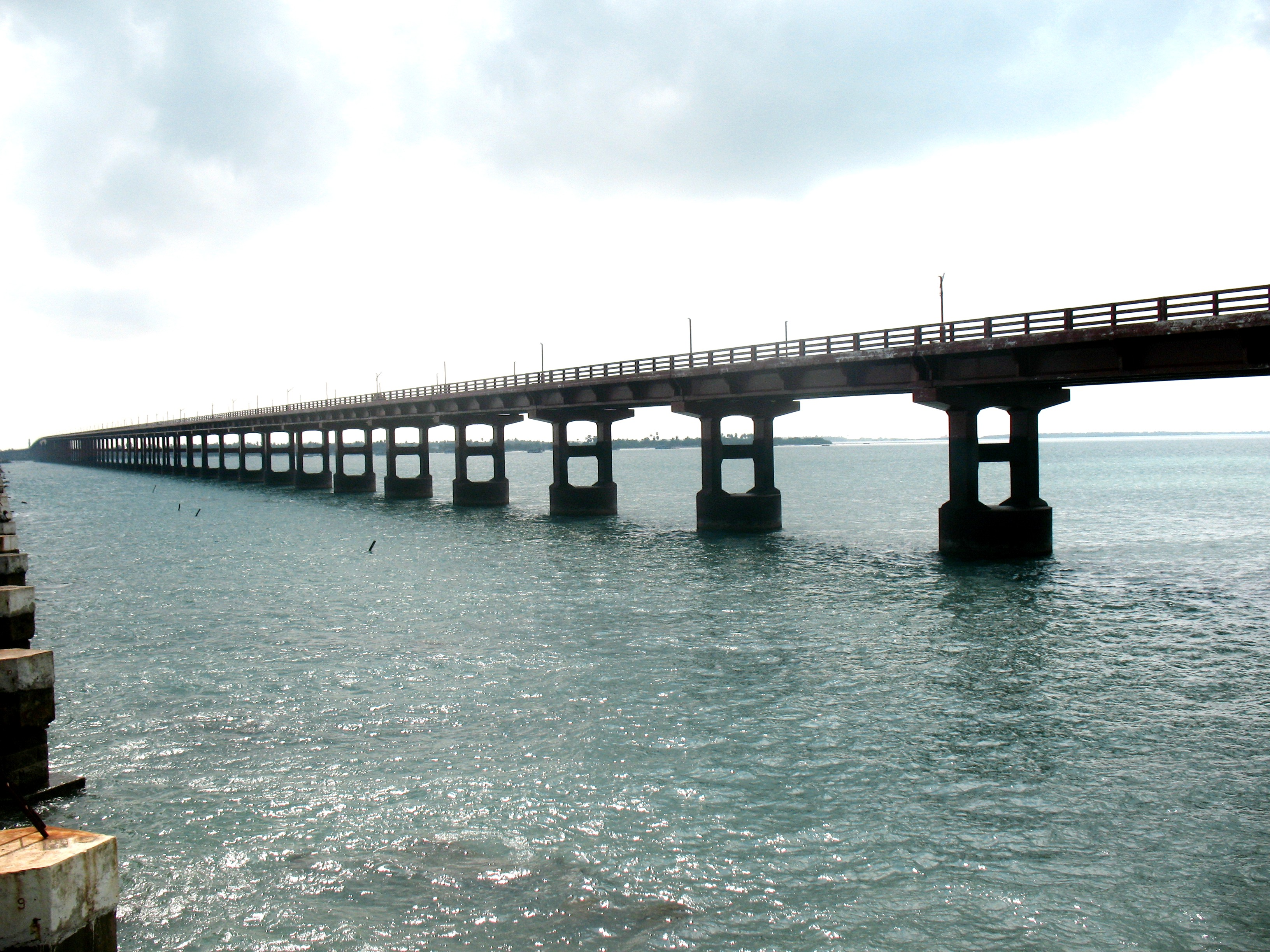 പാമ്പൻ പാലം